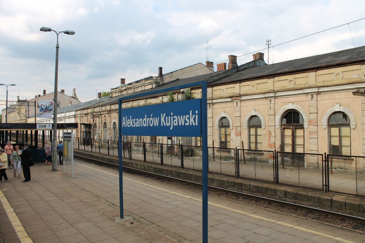 Budynek i peron stacji w Aleksandrowie Kujawskim. This photo was taken during Railway Wikiexpedition 2014 set up by Wikimedia Polska Association in cooperation with Fundacja Grupy PKP.You can see all photographs in category Wikiekspedycja kolejowa 2014.